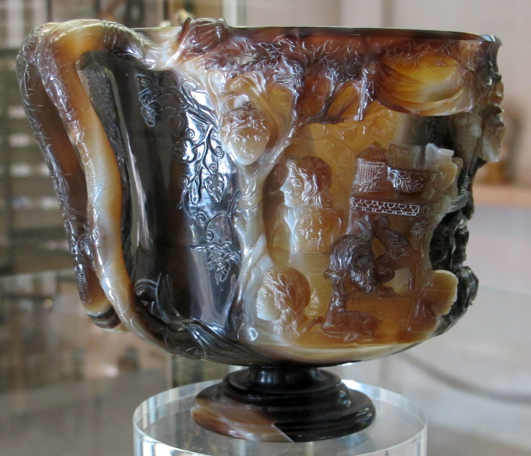 Arte ellenistica (alessandria), coppa detta di tolomeo con preparativi di cerimonia dionisiaca, sardonice, I sec. ac.-I dc